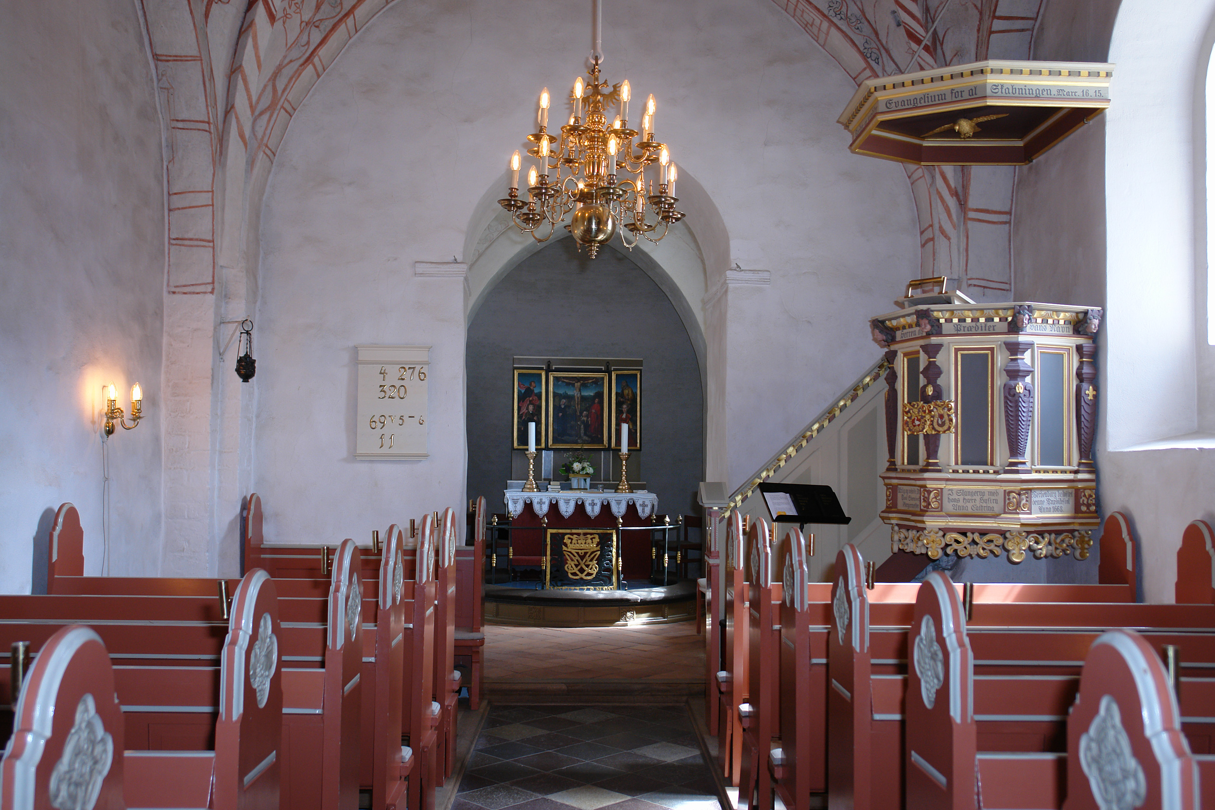 Kirche von Nødebo, Dänemark (Nord-Seeland). Kreuzigungsaltar (um 1525), Kanzel (1668)